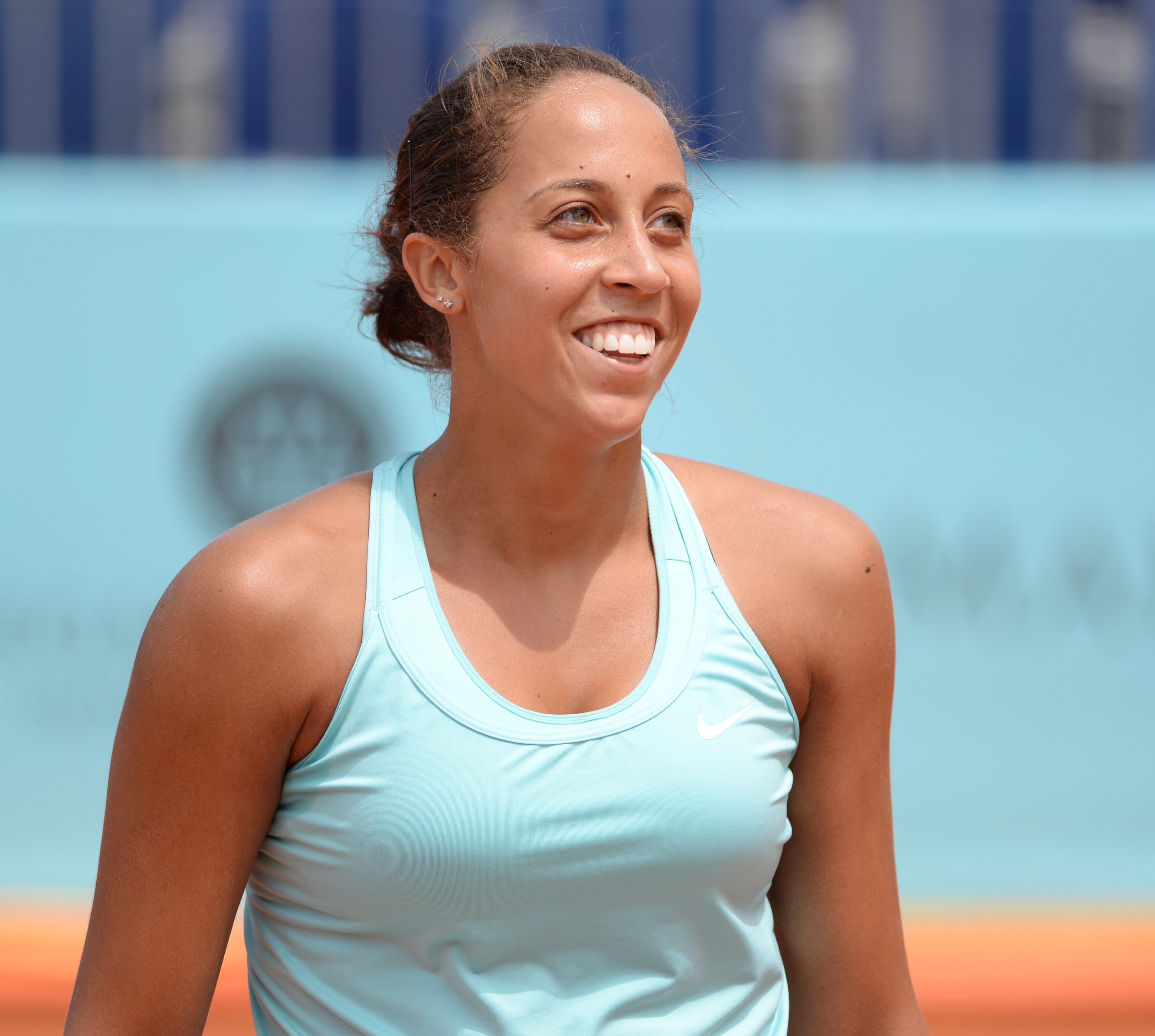 Madison Keys